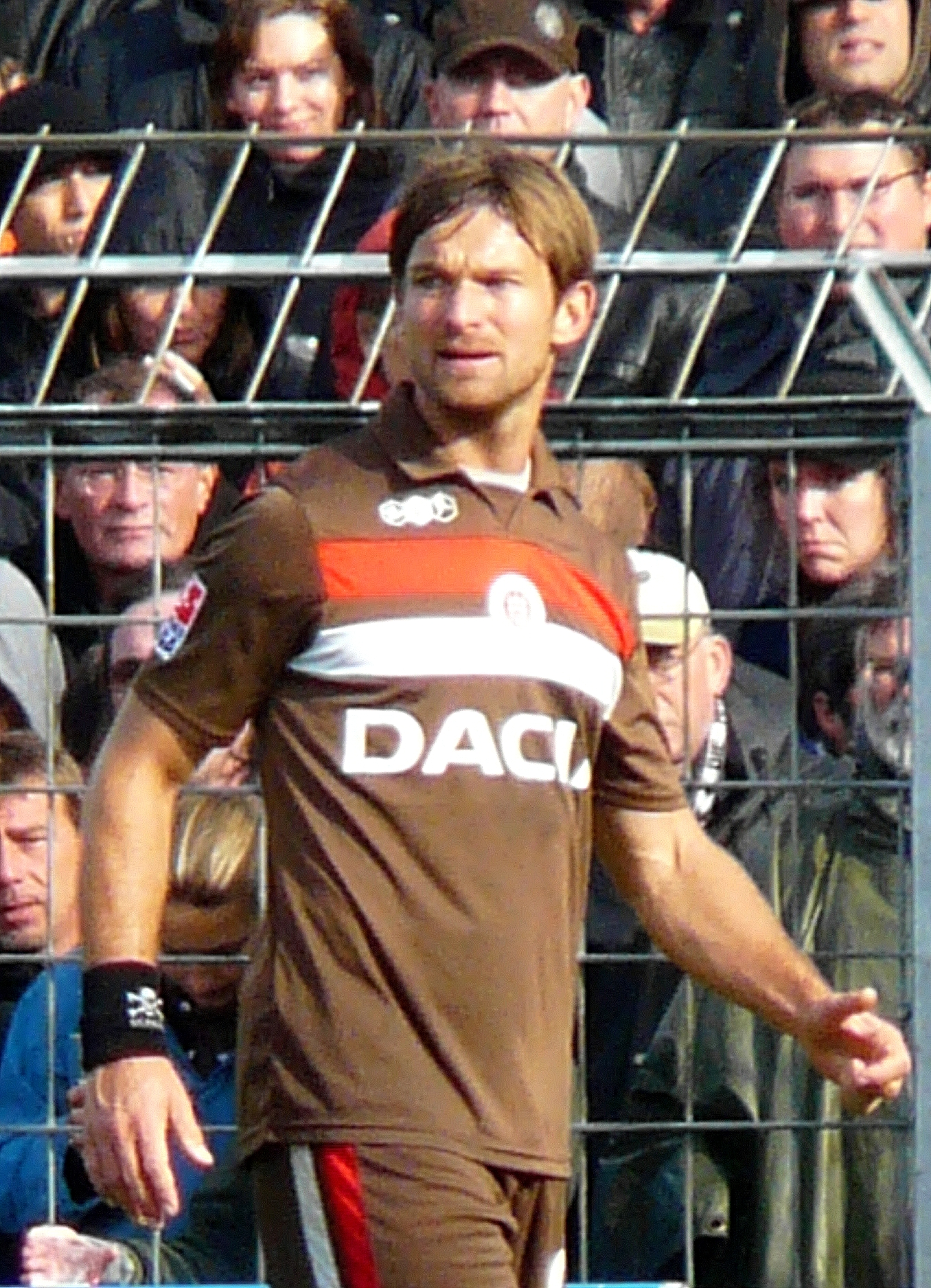 Florian Lechner FC St. Pauli